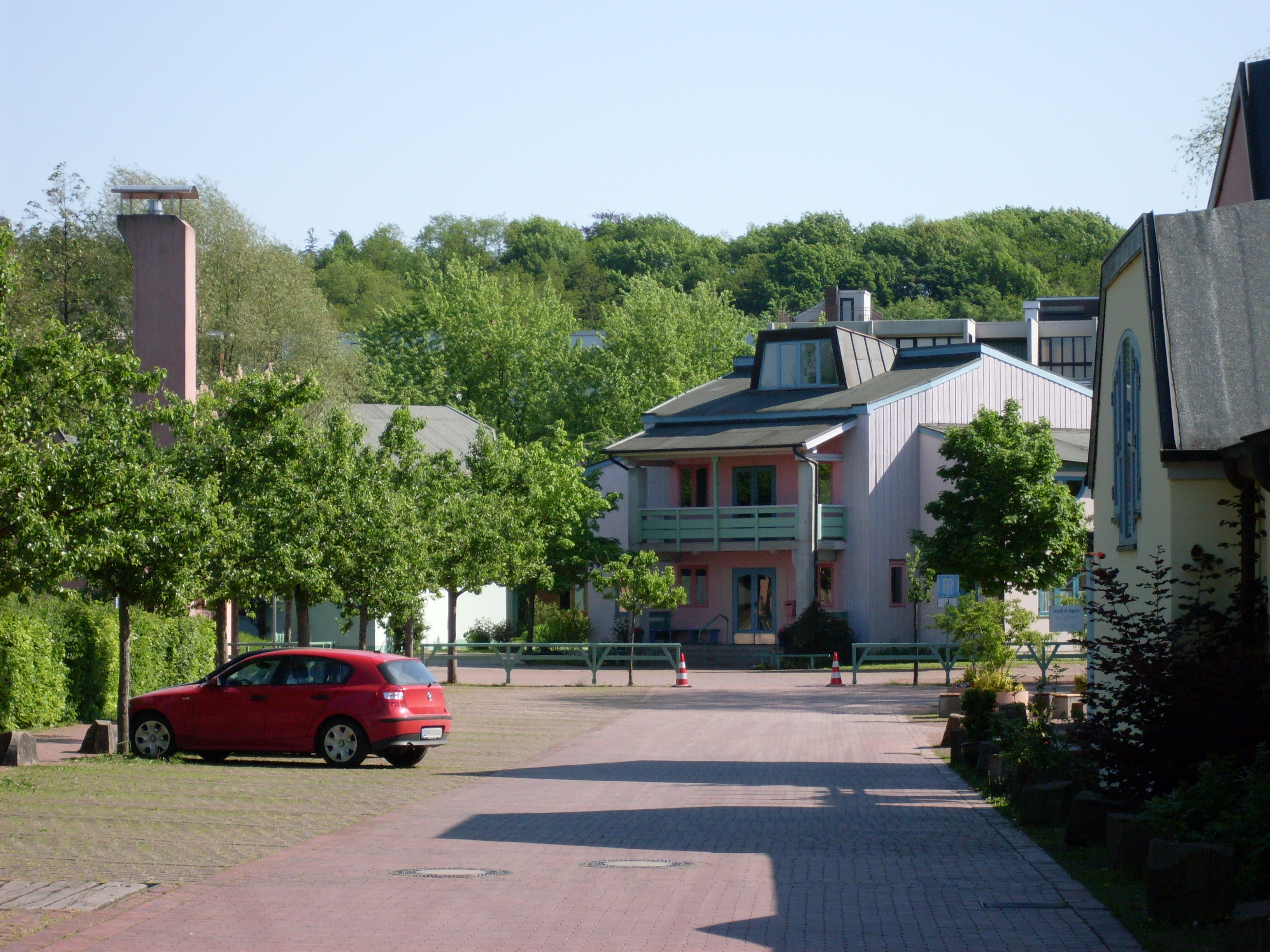 Rudolf-Steiner-Schule (freie Waldorfschule) in Düsseldorf-Gerresheim